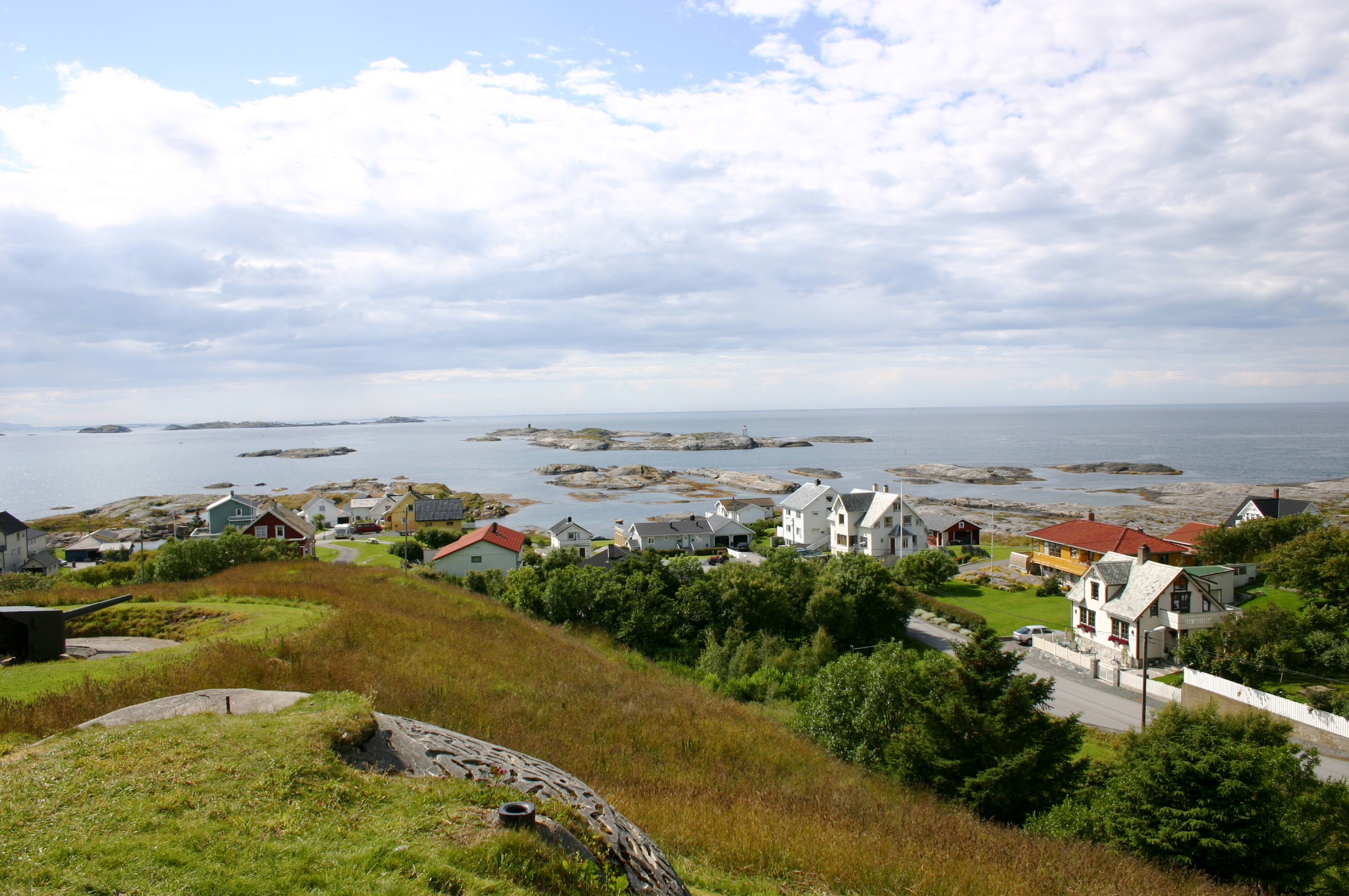 Bud i Romsdal